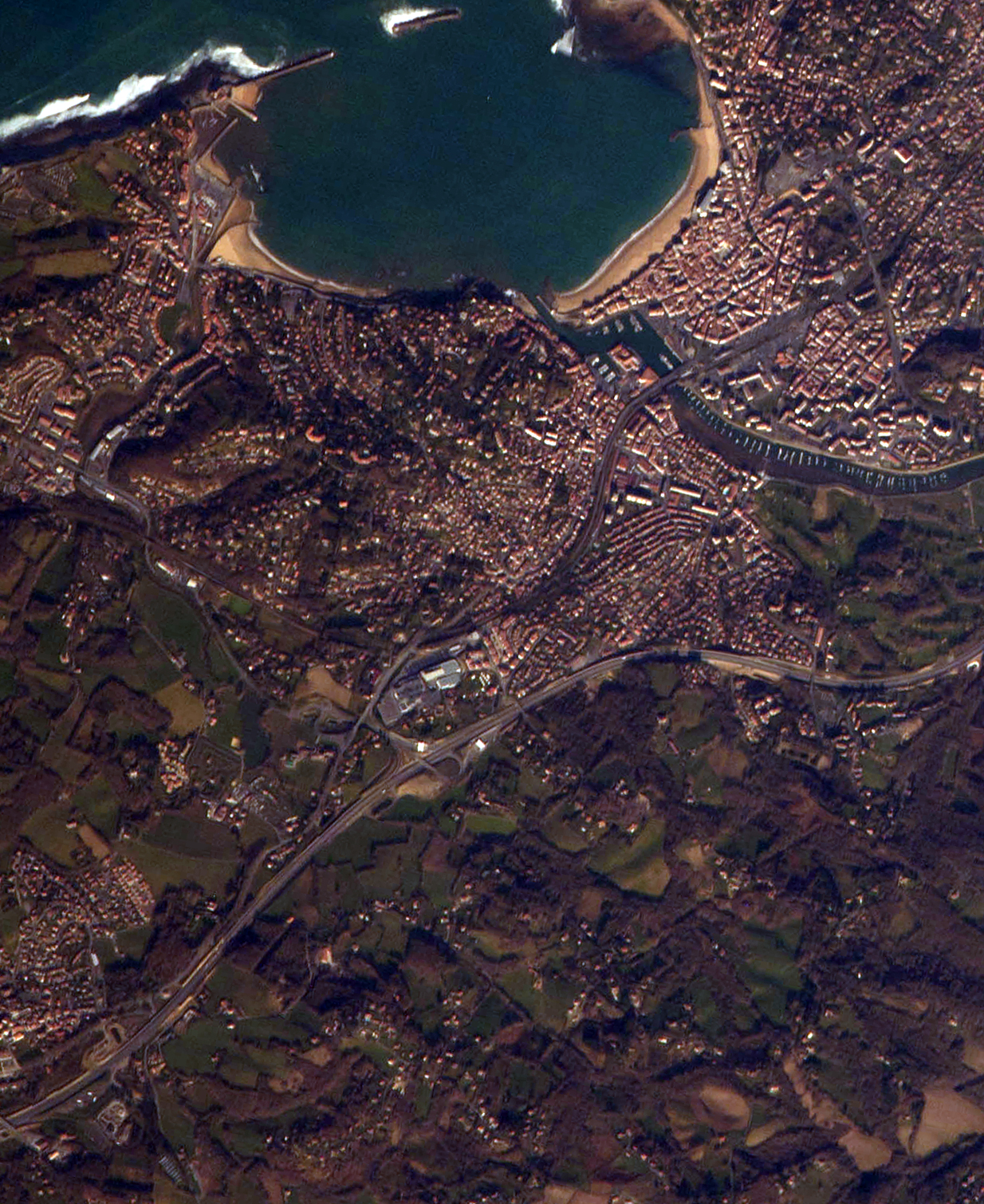 Ziburu, Nazioarteko Espazio Estaziotik ikusia.